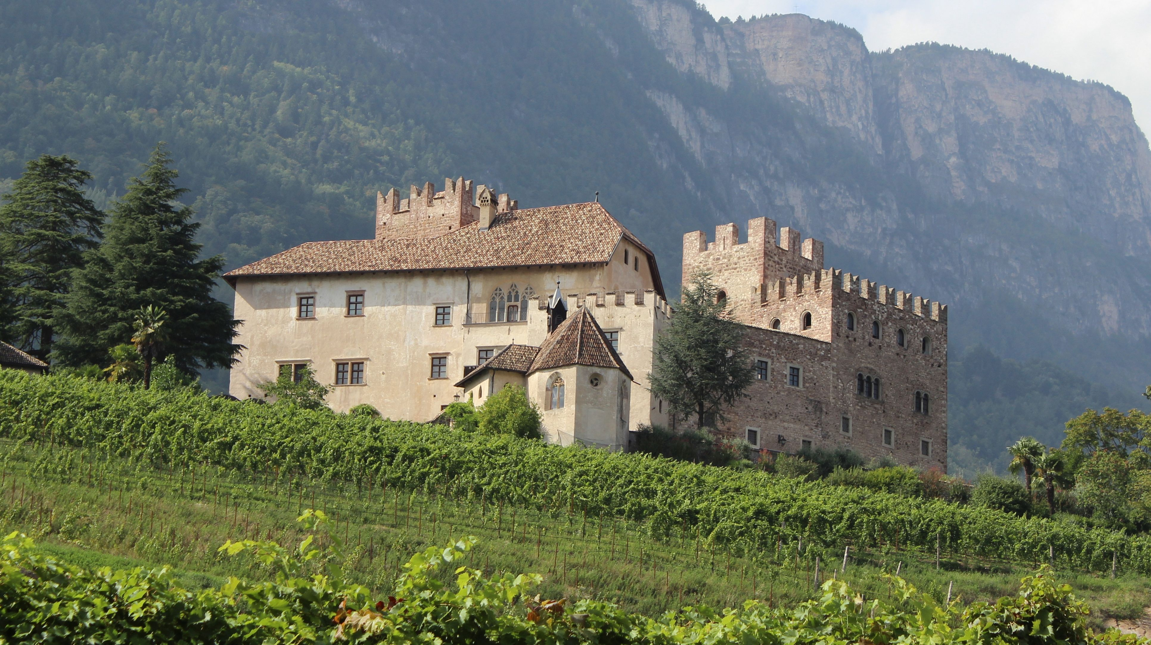 Schloss Freudenstein mit St.-Andreas-Kapelle in Eppan